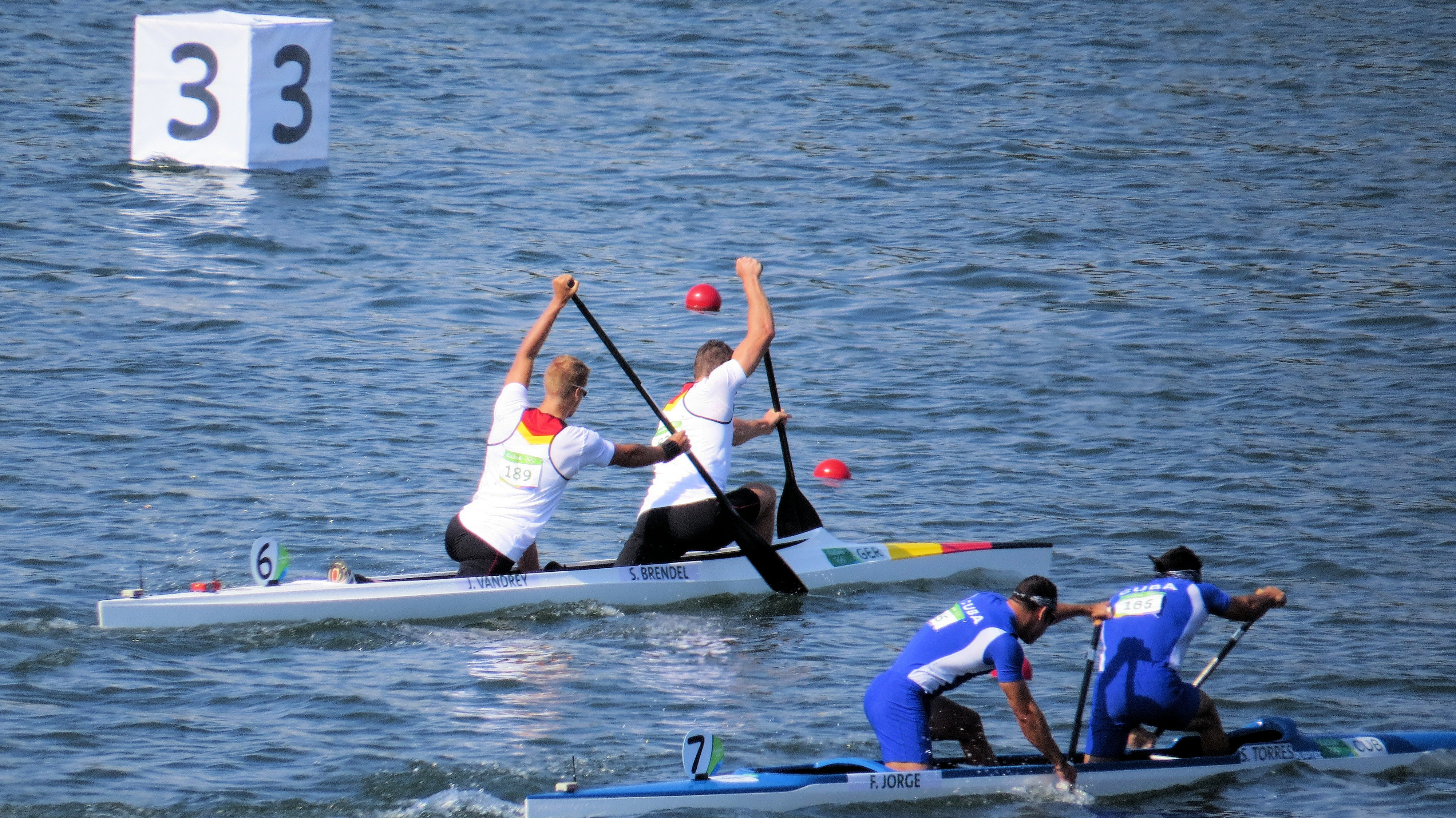 Sx50